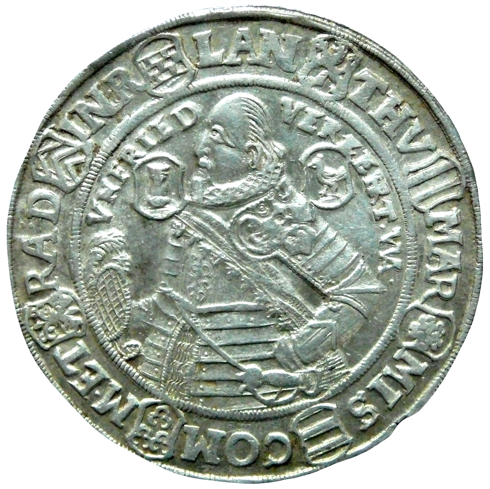 Gemeinsame Münzprägung 1596-1633 Johann Casimir Herzog von Sachsen-Coburg und Johann Ernst Herzog von Sachsen-Eisenach Eintrachtstaler mit Spruch: "FRIED ERNEHRT -VNFRIED VERZEHRT" 1626 Münzstätte Saalfeld, Münzmeister Wolf Albrecht der Jüngere Reichstaler im Reichsmünzfuß: Ag 888,89‰ Feingewicht: 25,984 g Gewicht: 29,232 g Durchmesser: 43,95-44,22 mm Dicke: 2,42 mm